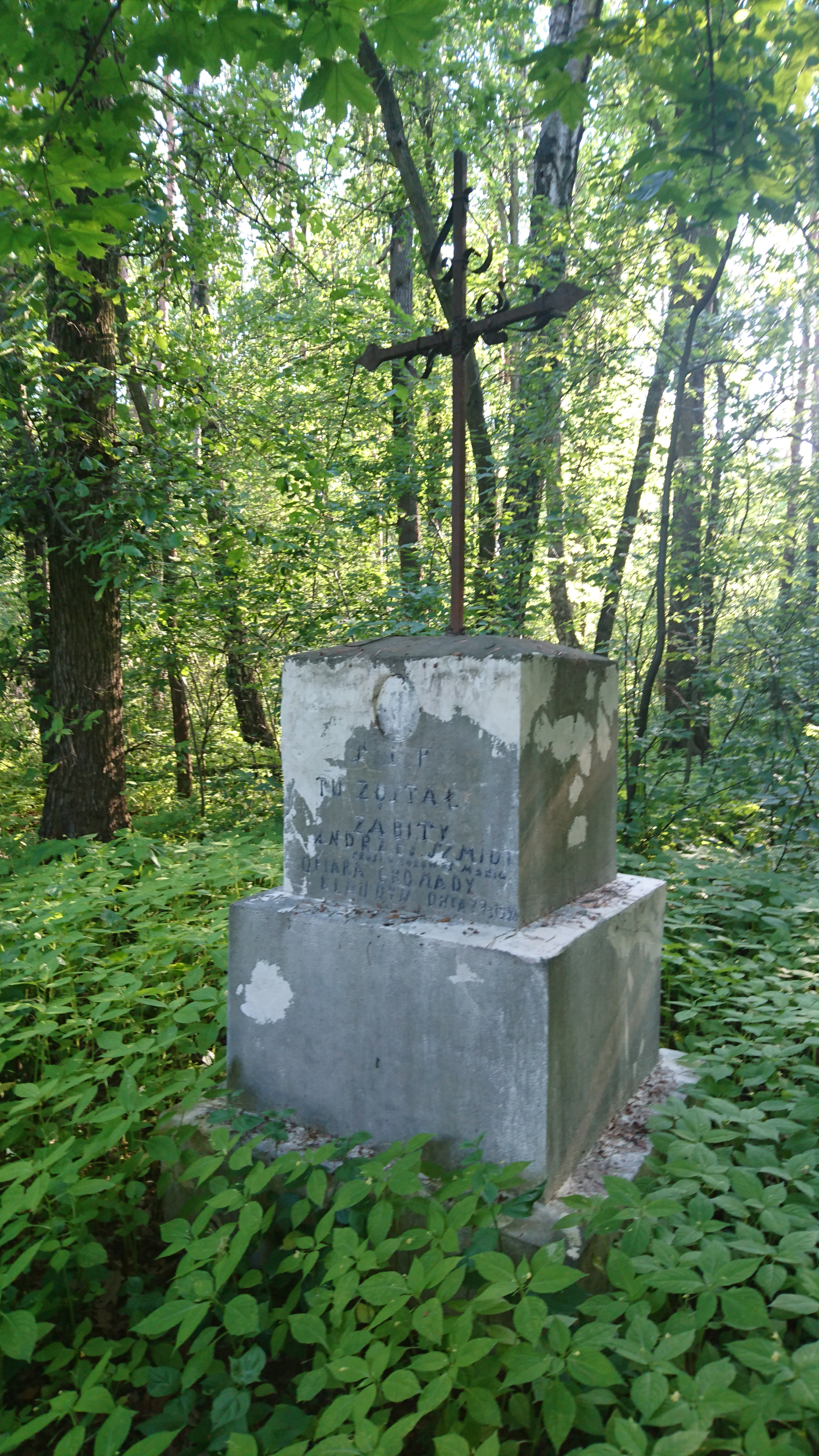 Pomnik upamiętniający Andrzeja Szmidta (pochowanego w Starych Babicach) zamordowanego w tym miejscu 28 marca 1938 roku.